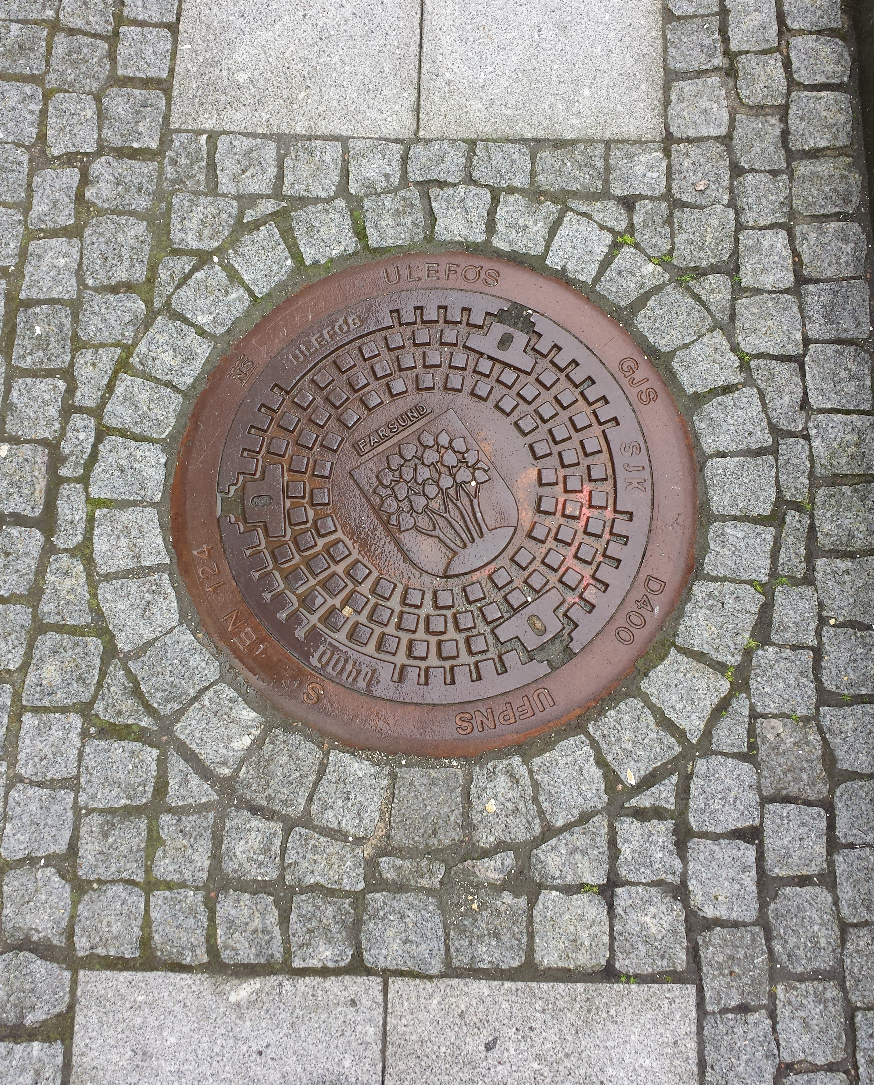 Schachtdeckel in Farsund (Norwegen)